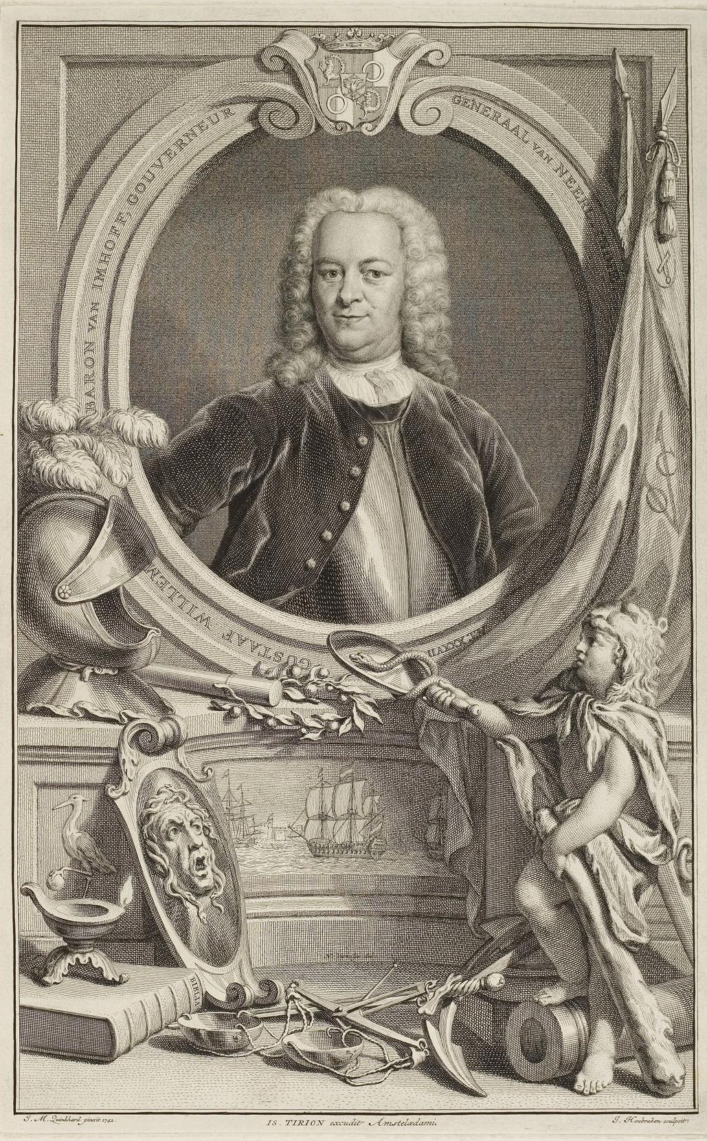 Grafik aus dem Klebeband Nr. 1 der Fürstlich Waldeckschen Hofbibliothek Arolsen Motiv: Gustaaf Willem van Imhoff, Generalgouverneur von Niederländisch-Indien